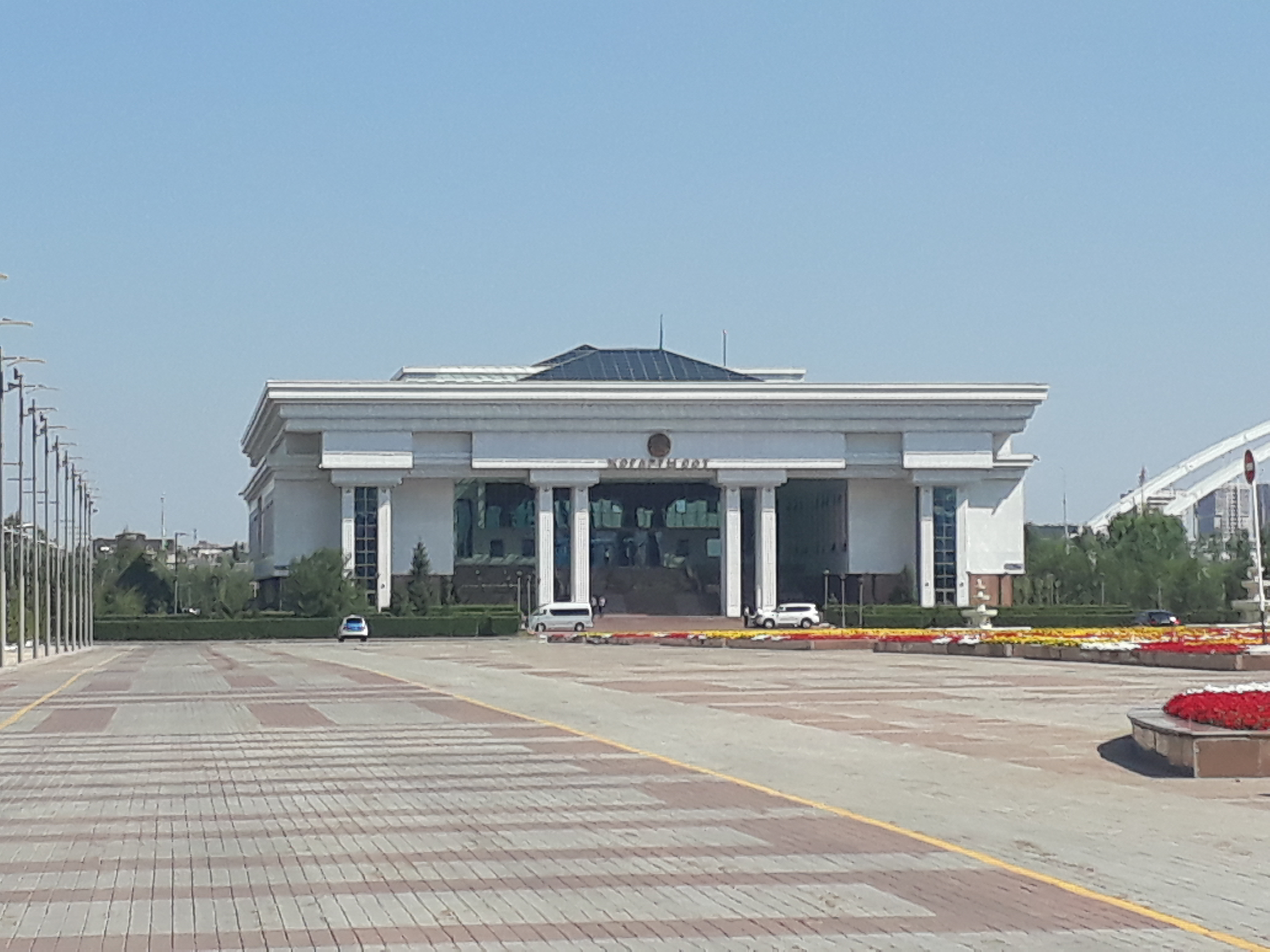 Лето 2017